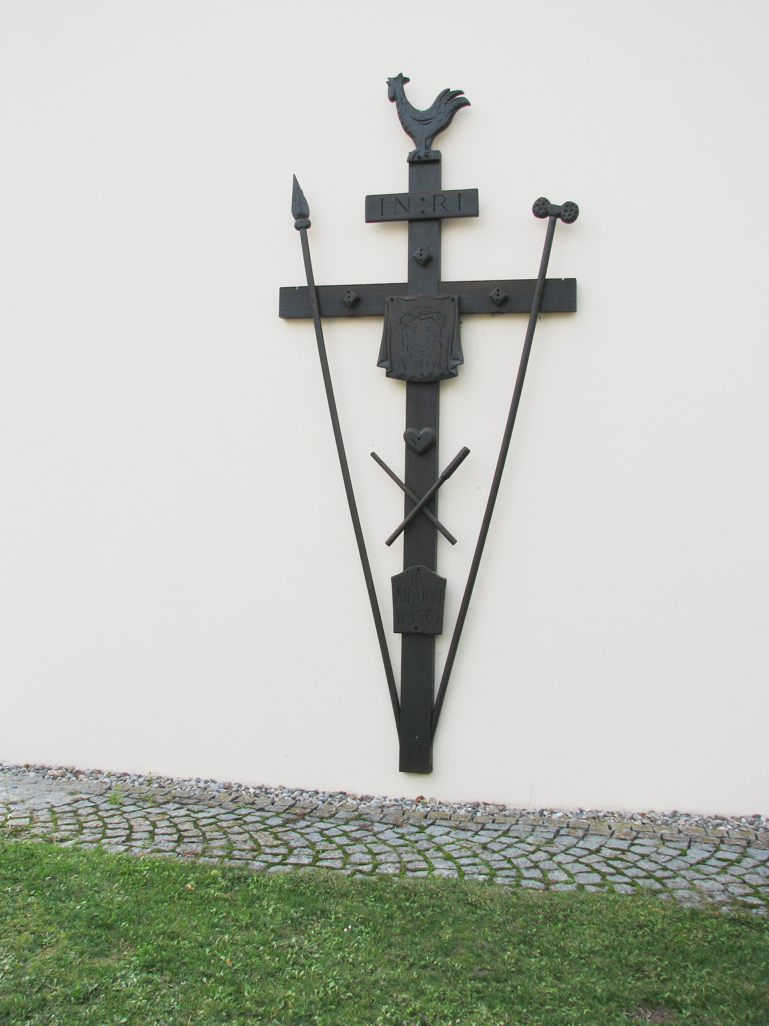 Kaising, Ortsteil der Stadt Greding im mittelfränkischen Landkreis Roth in Bayern, Arma Christi-Kreuz an der Dorfkirche